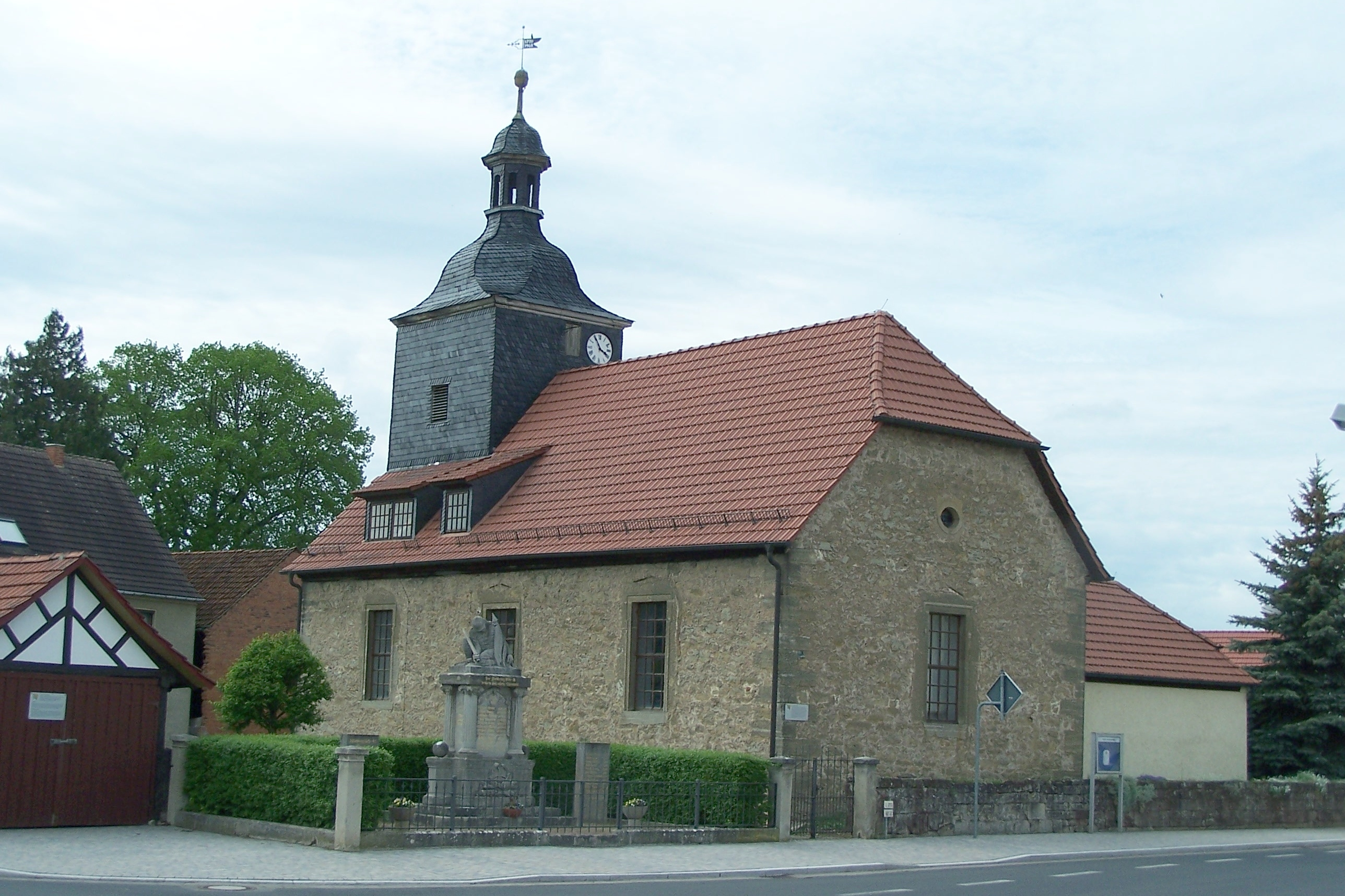 Ansicht der Nikolaikirche in Lauterbach im Wartburgkreis.